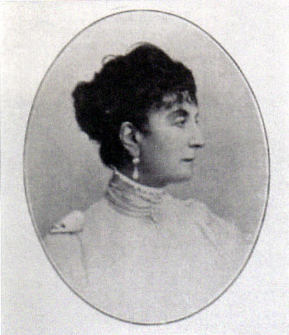 Ersilia Caetani Lovatelli (Roma, 12 ottobre 1840 – Roma, 22 dicembre 1925), accademica italiana, annoverata come prima donna ad entrare nell' Accademia dei Lincei, nel maggio 1879.